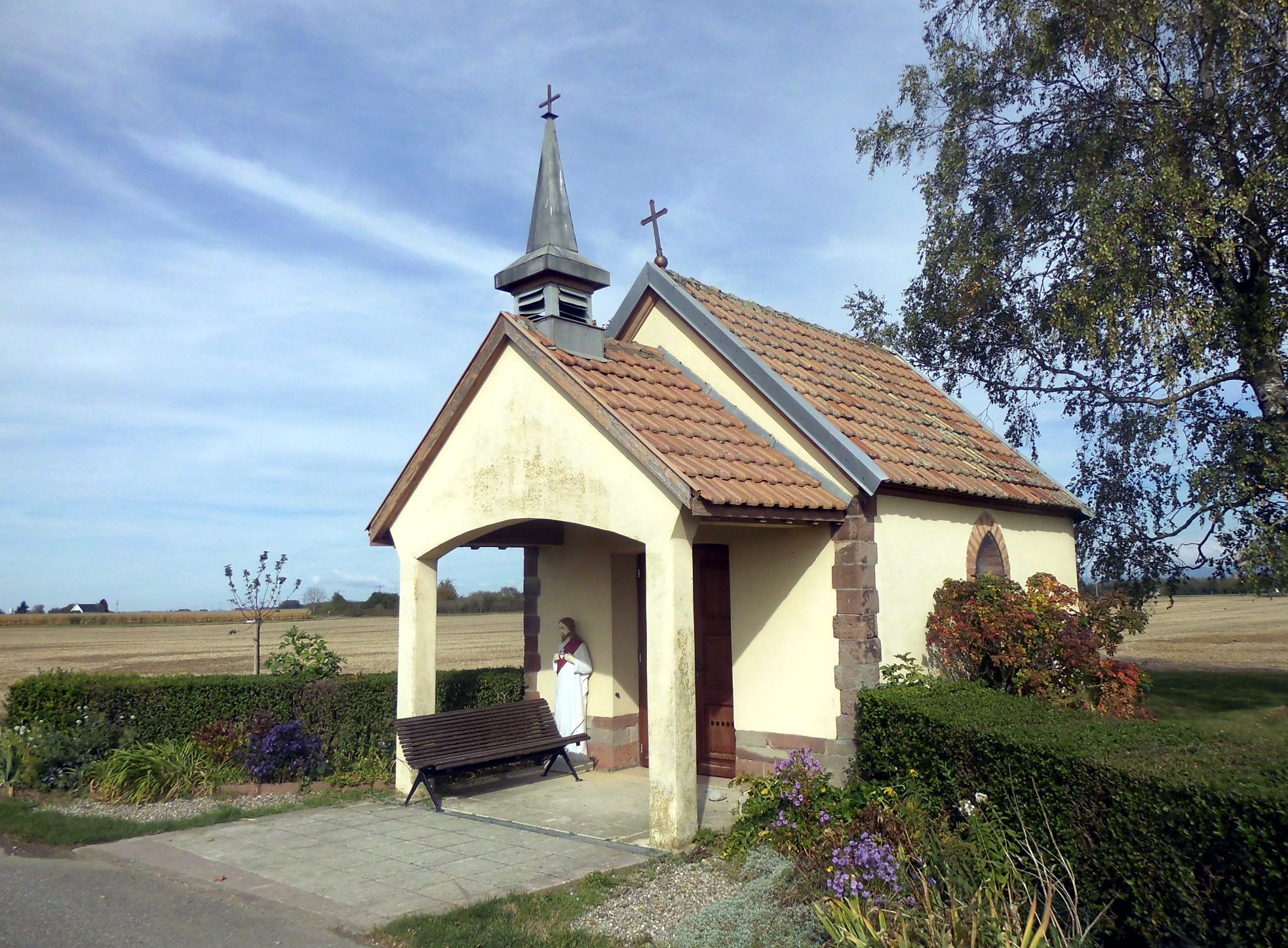 La chapelle Notre-Dame-des-Champs de Bantzenheim